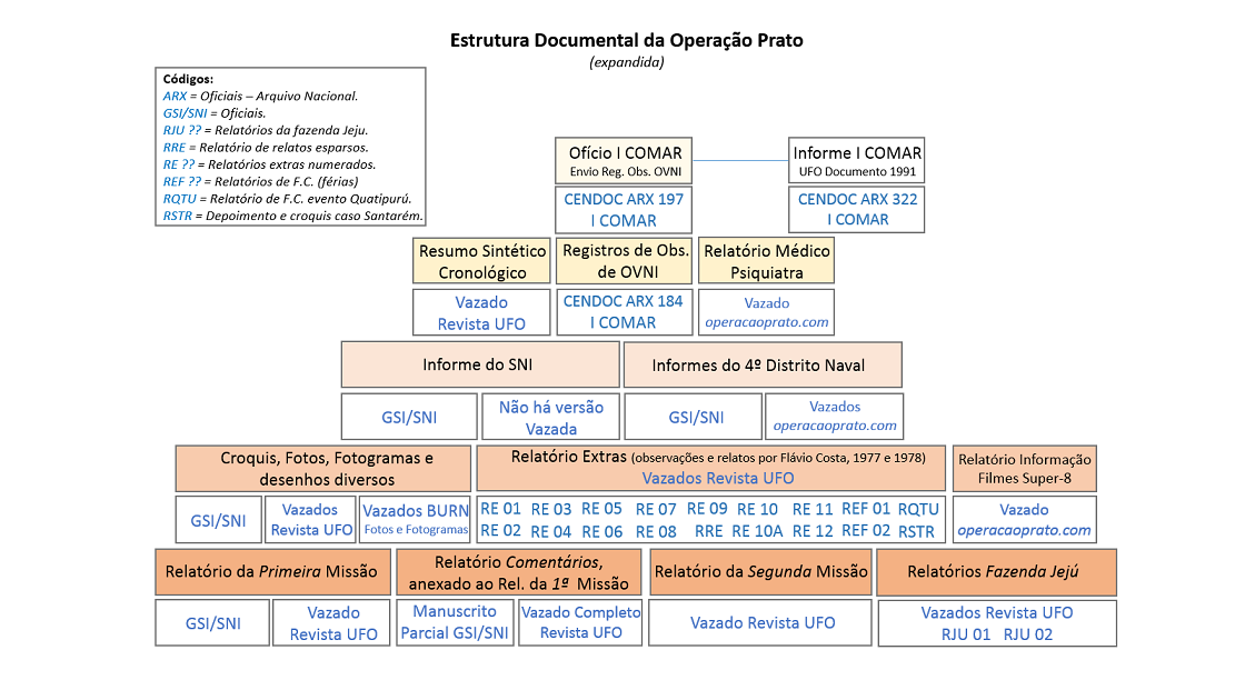 Imagem de gráfico elaborado no programa power-point por Hélio Aniceto, para uso em artigo em que é co-autor para o site ( site do qual é um dos fundadores. Mesmo sendo autor da imagem, tem a permissão dos demais fundadores para divulgação da imagem na Commons.